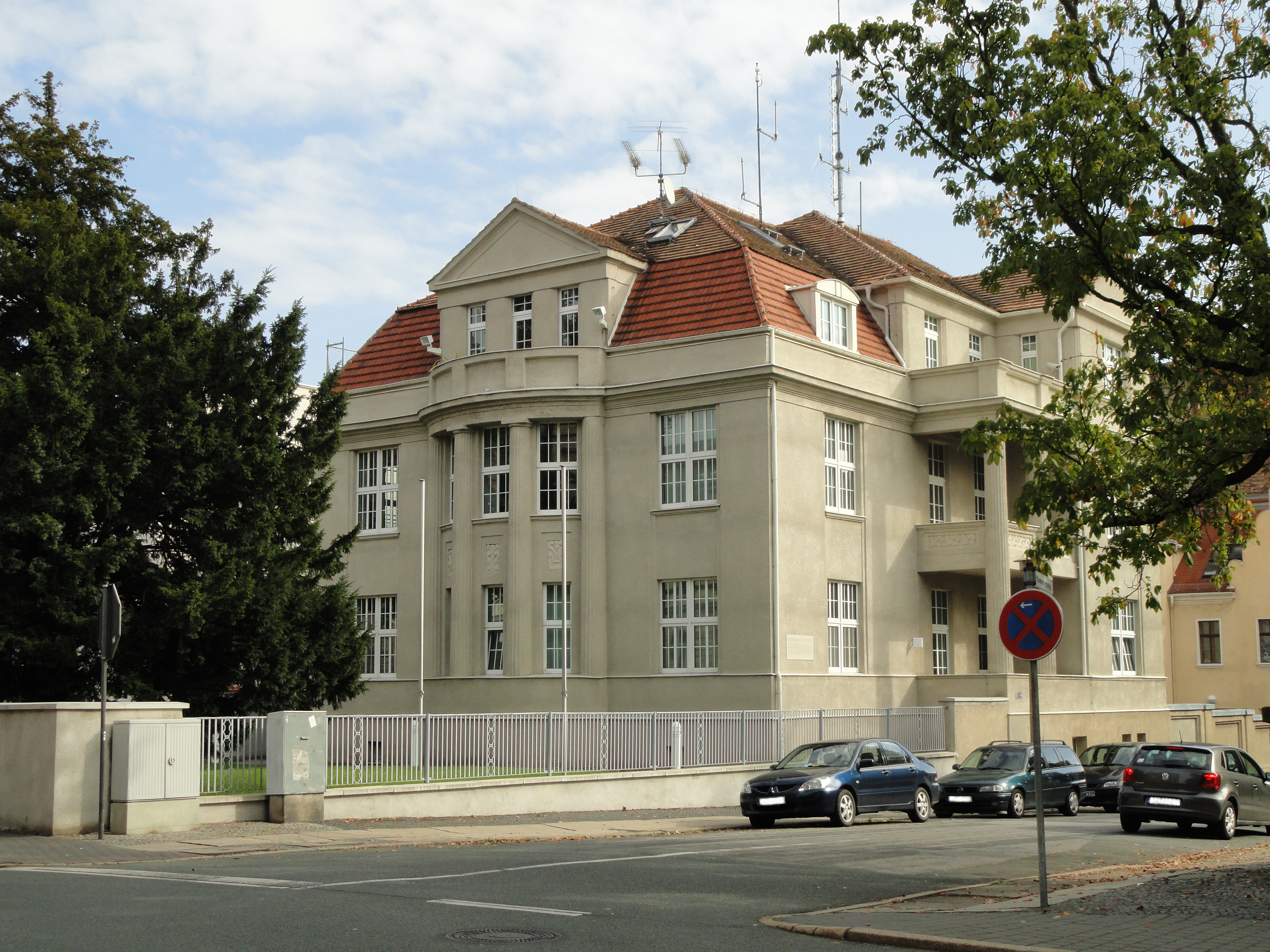 James-von-Moltke-Straße 7 in Görlitz, bis 2015 Sitz der Polizeidirektion Oberlausitz-Niederschlesien